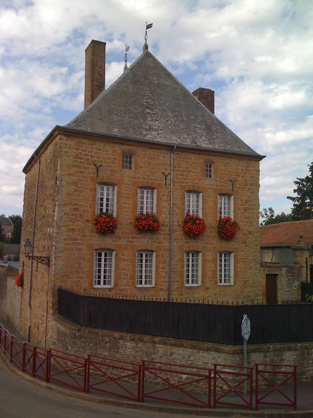 Le château de Tournes